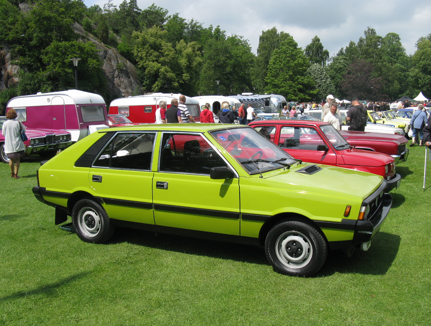 FSO Polonez